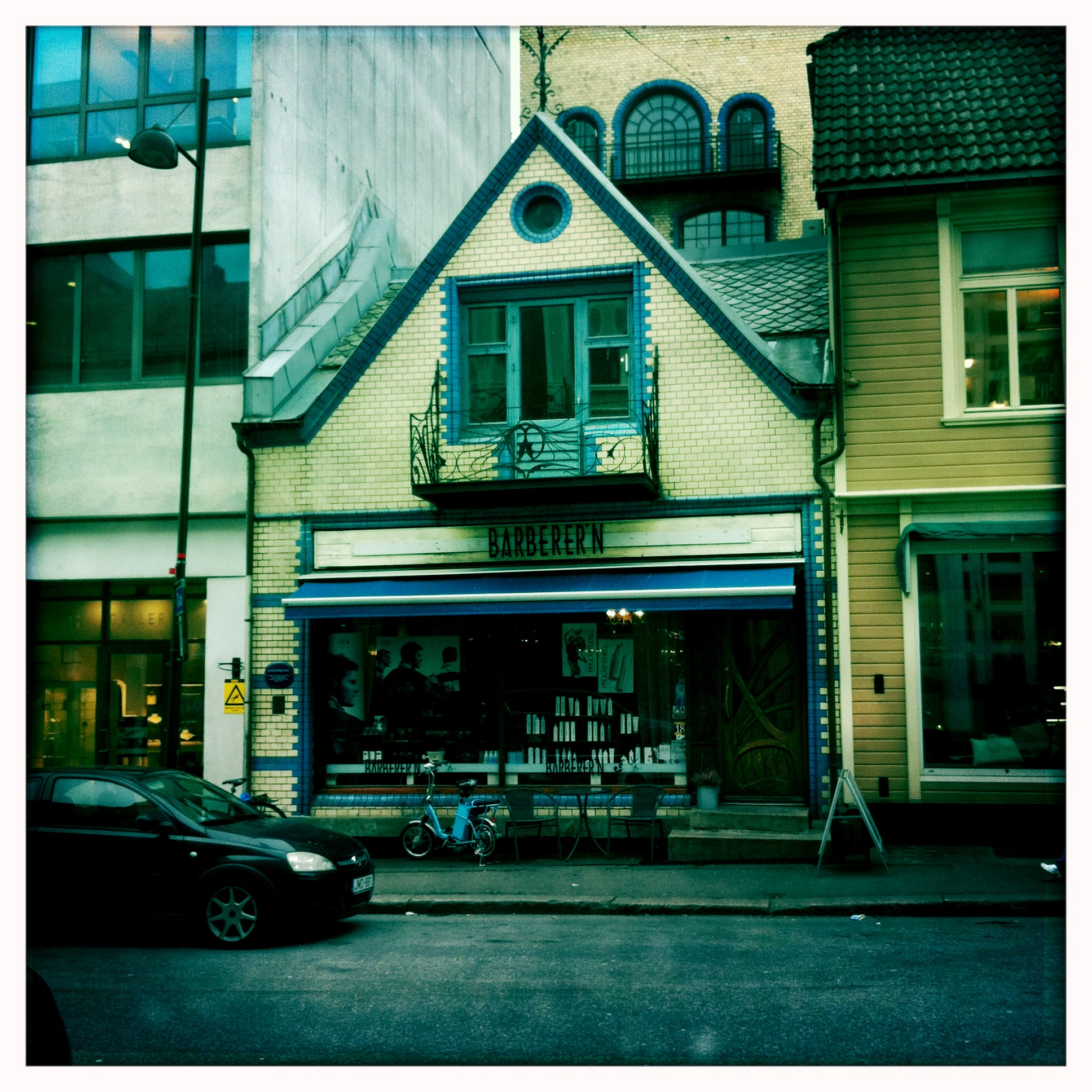 Bryggebakken eller Rådhusgaten 5 er lokalet som Camillo Bastrup oppførte. I dag huser det en herrefrisør. Det gamle fabrikklokalet er teglveggen i bakgrunnen.